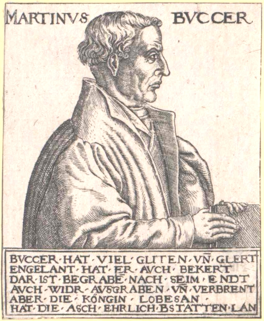 Martinus Bucer (1491–1551); Radierung